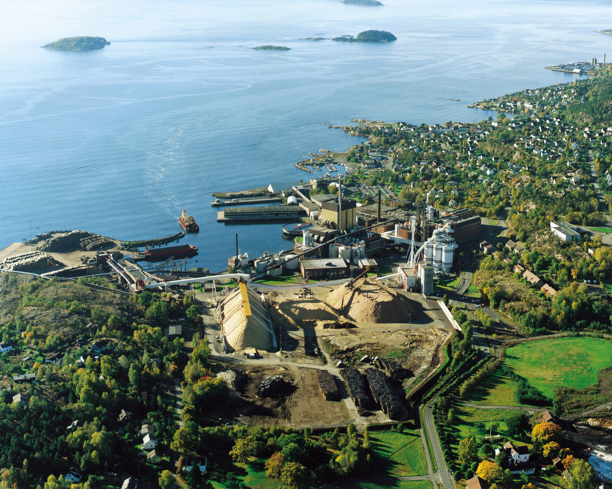 Tofte Cellulosefabrikk